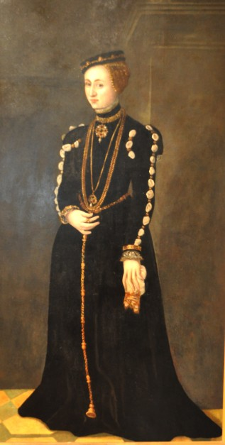 Rosenberg Éva grófnő. Szigetvári Zrínyi Miklós hadvezér felesége.